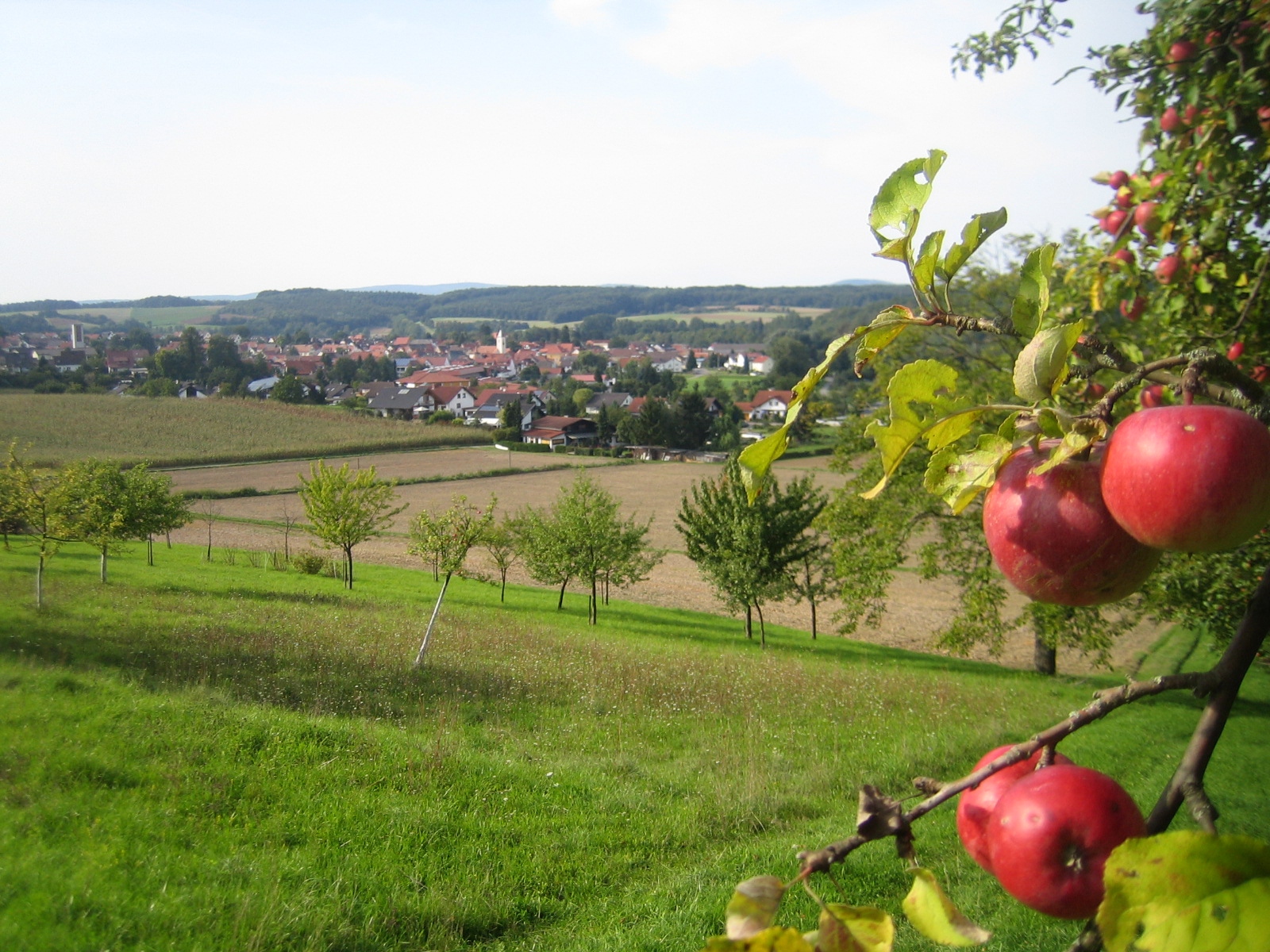 Eschelbronn Panorama